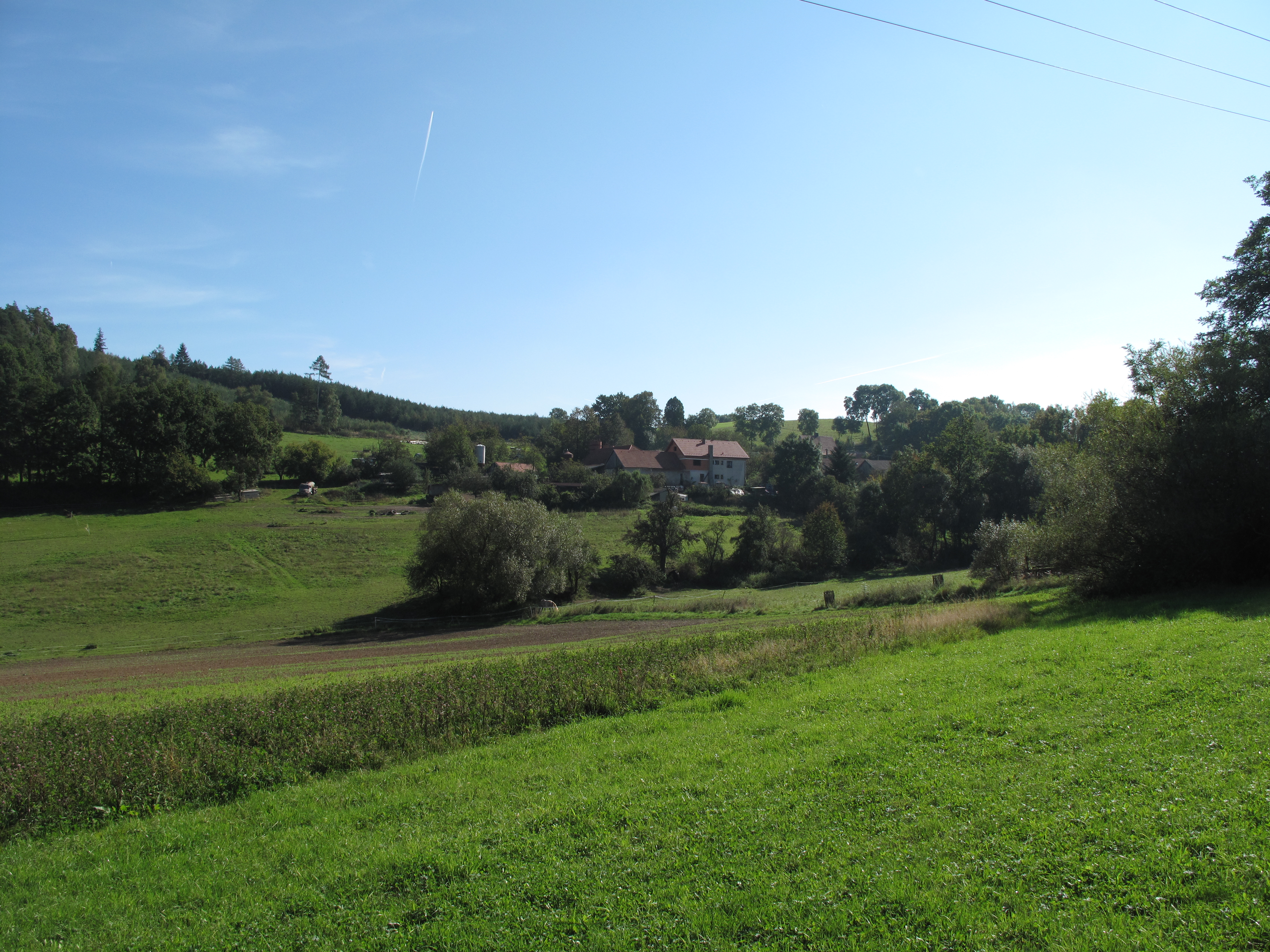 Severní část Lipky. Okres Benešov, Česká republika.